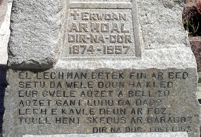 Koadoud. Bez Dir-na-dor. 2